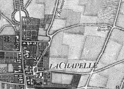 Detail du Plan de Roussel (1730), Croix de l'Evangile a l'angle de la rue de l'Evangile et de la rue d'Aubervilliers, Paris.